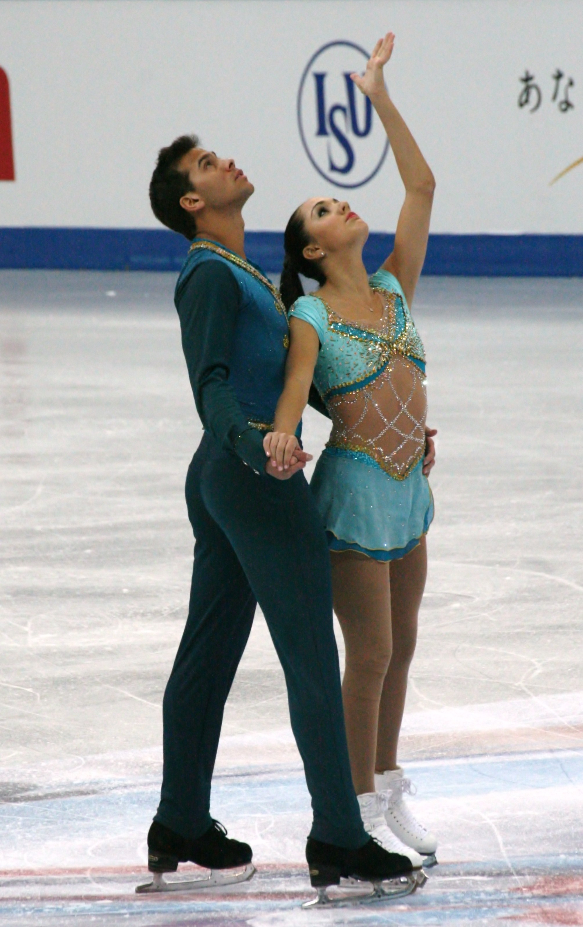 Бриттани Джонс и Йен Бехарри (Канада) на финале Гран-при среди юниоров 2012-2013. Короткая программа.